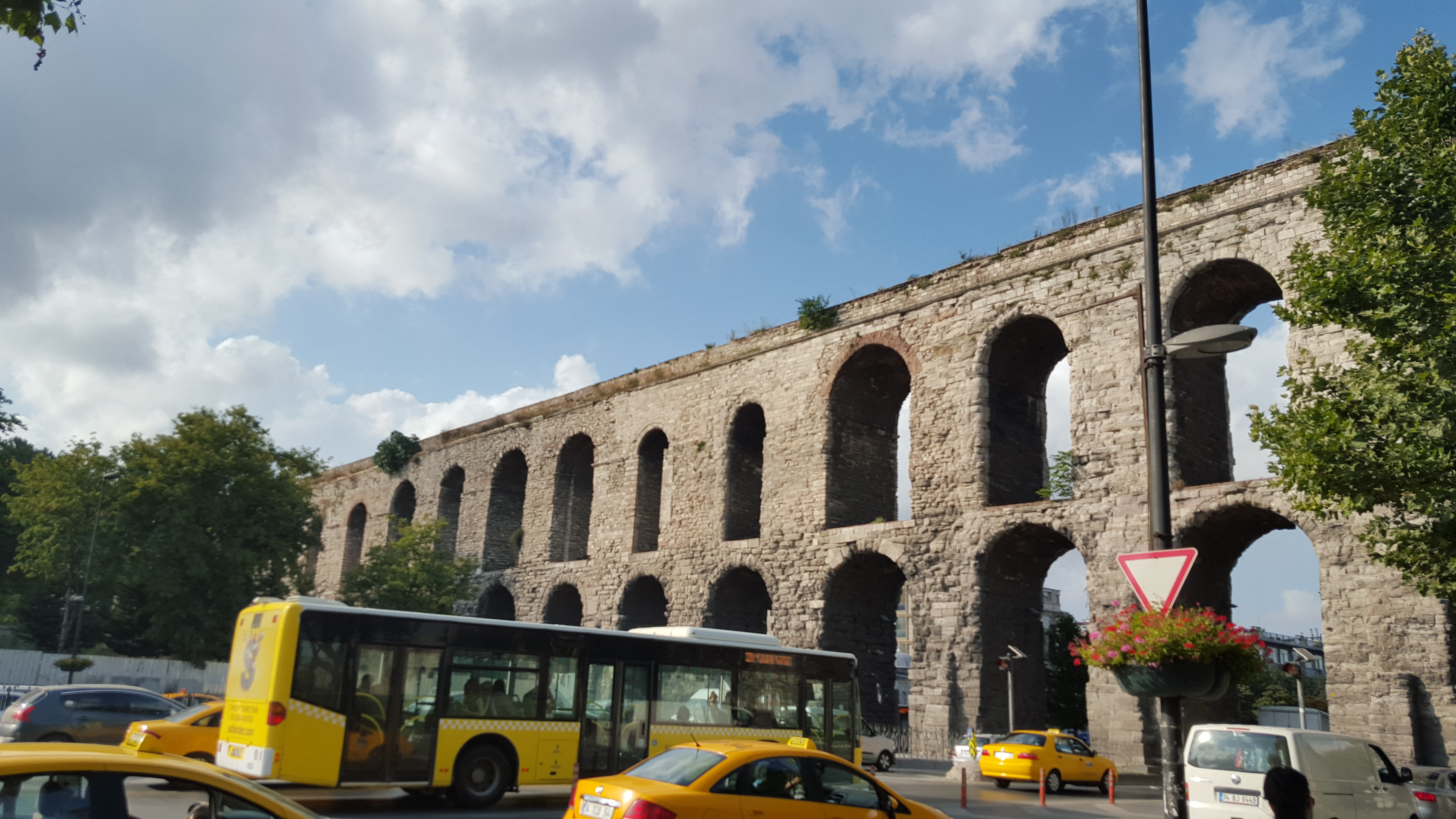 אמת מים בחלק האירופאי העתיק של איסטנבול